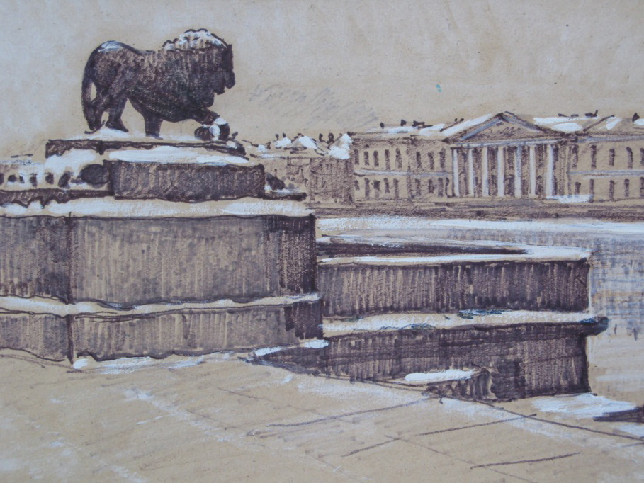 С.П.Хаджибаронов "Набережная Невы"